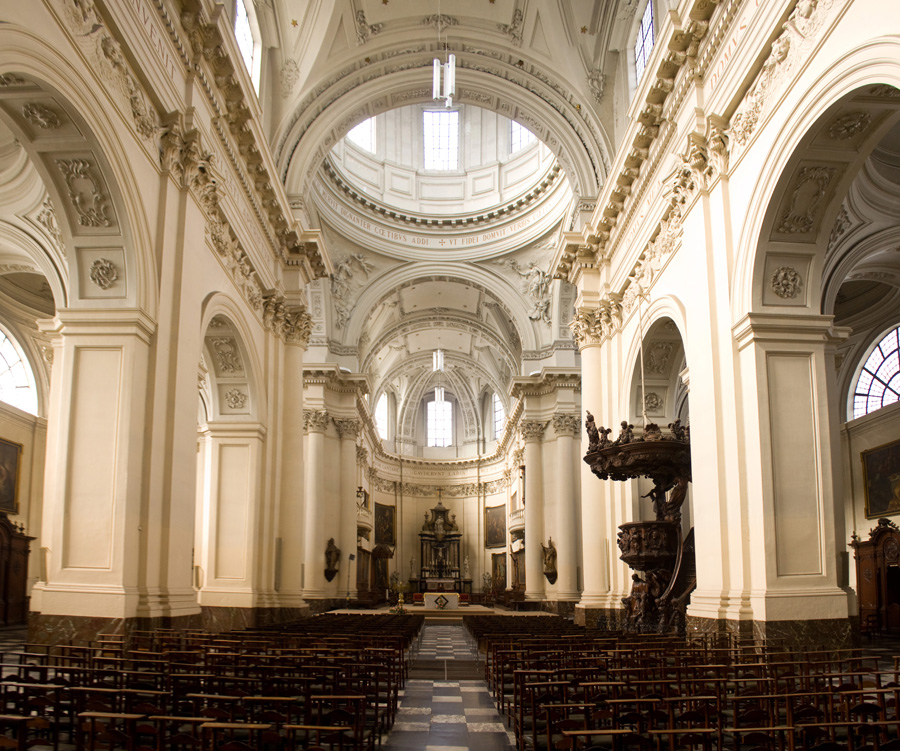 kathedraal van Sint-Aubain, Namen